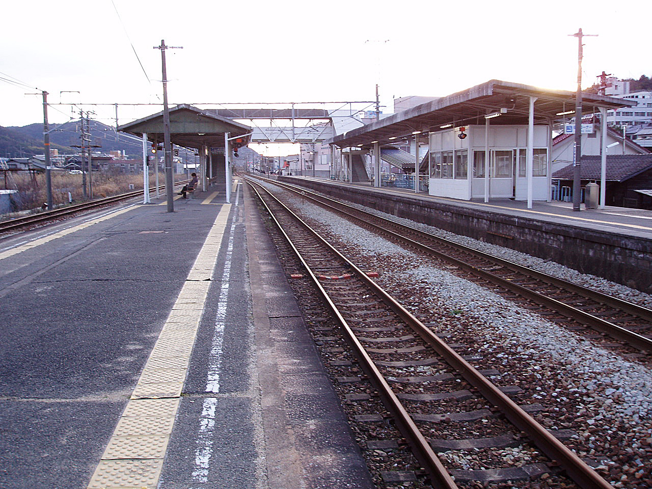 West Japan Railway Sanyo Main Line Bingo-Akasaka Station Platform 西日本旅客鉄道 山陽本線 備後赤坂駅 駅ホーム